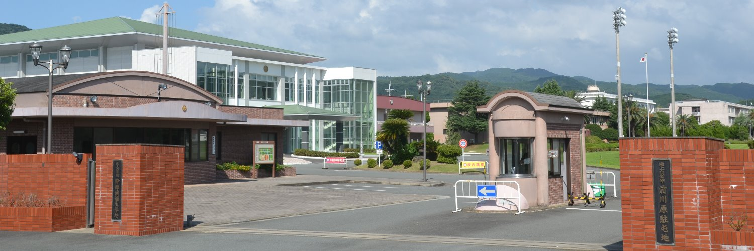 陸上自衛隊幹部候補生学校（前川原駐屯地）正門